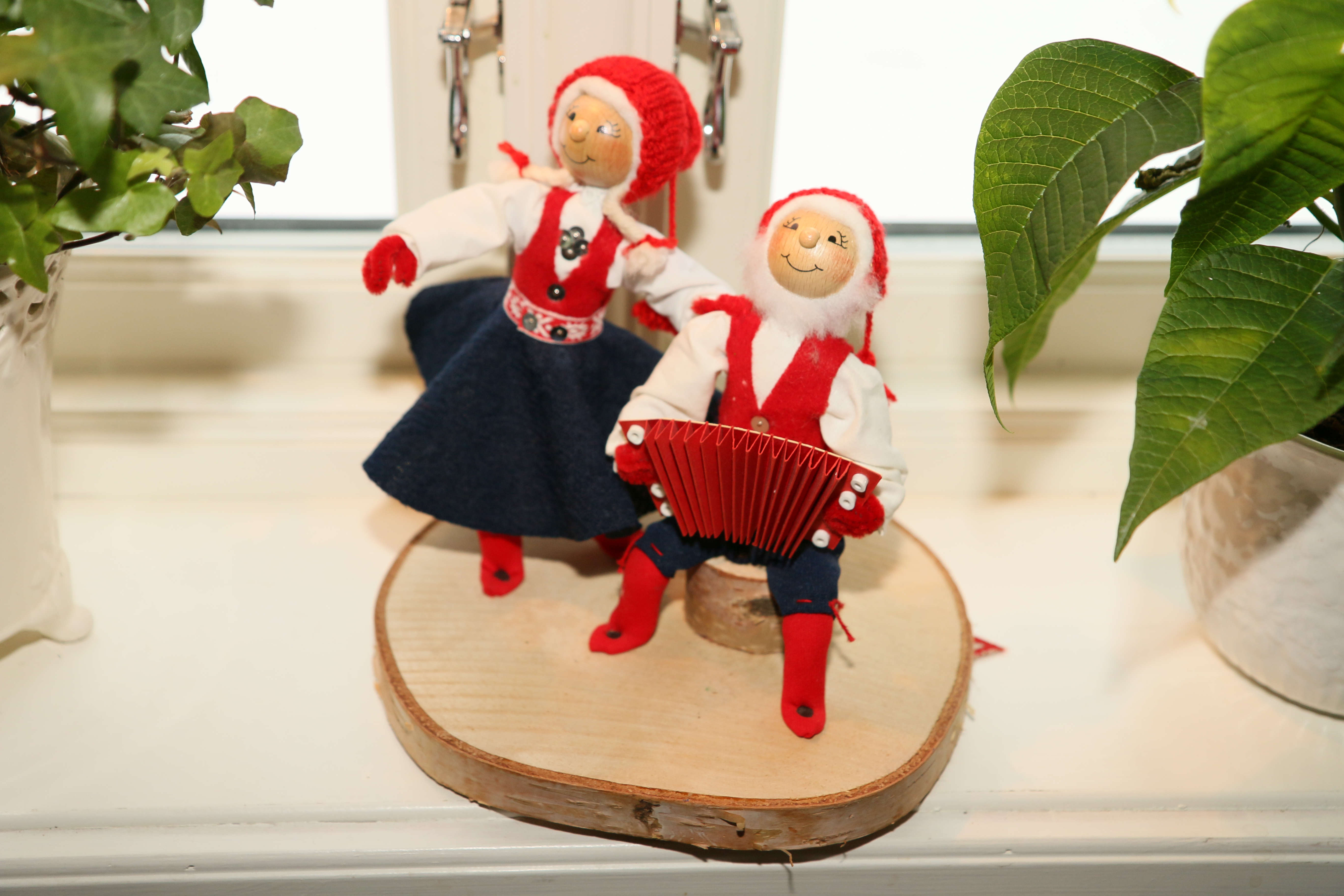 Nisser i vinduskarmen